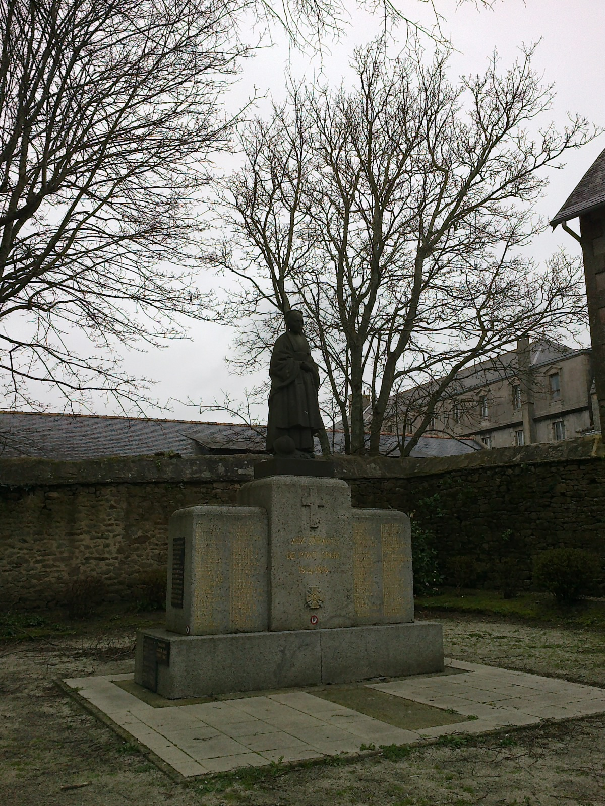 Finistere Pont-Croix ND-Roscudon Monument Morts